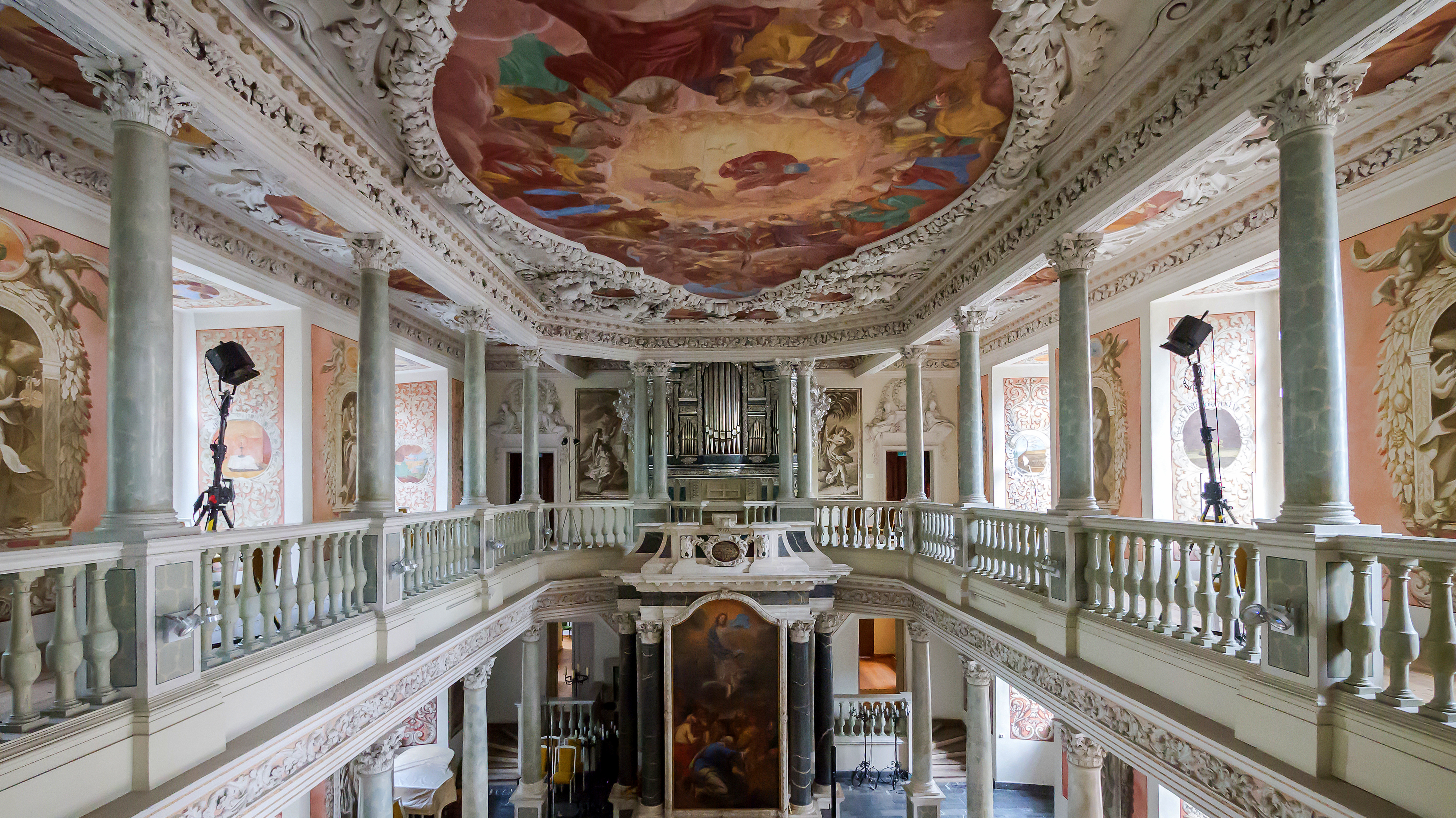 Saalfeld-Saale Schloßstraße 24 Schloss Bestandteil Sachgesamtheit "Schloss und Park Saalfeld Saale" Schlosskapelle 20